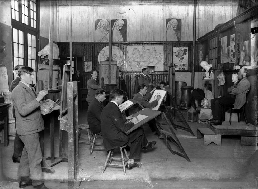 Leerlingen in actie omstreeks 1935 op de afdeling model tekenen/schilderen van de Middelbare Kunstnijverheidsschool, Brusselsestraat 60, Maastricht. Uit deze school kwam in 1959 de Stadsacademie voor Toegepaste Kunsten voort, sinds 2018 Maastricht Academy of Fine Arts and Design. Collectie glasnegatieven RHCL Maastricht, RAL G-387.